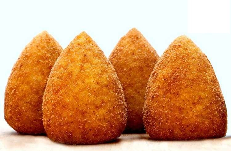 Arancini al ragù